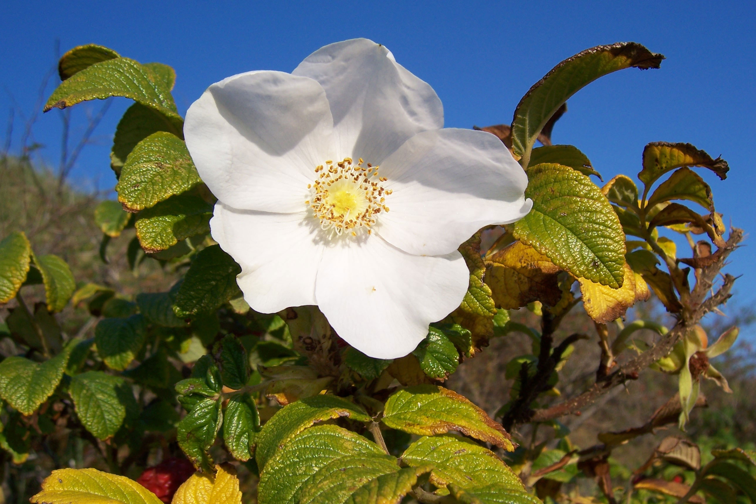 Nordseeinsel Spiekeroog. Kartoffelrose (rosa rugosa)